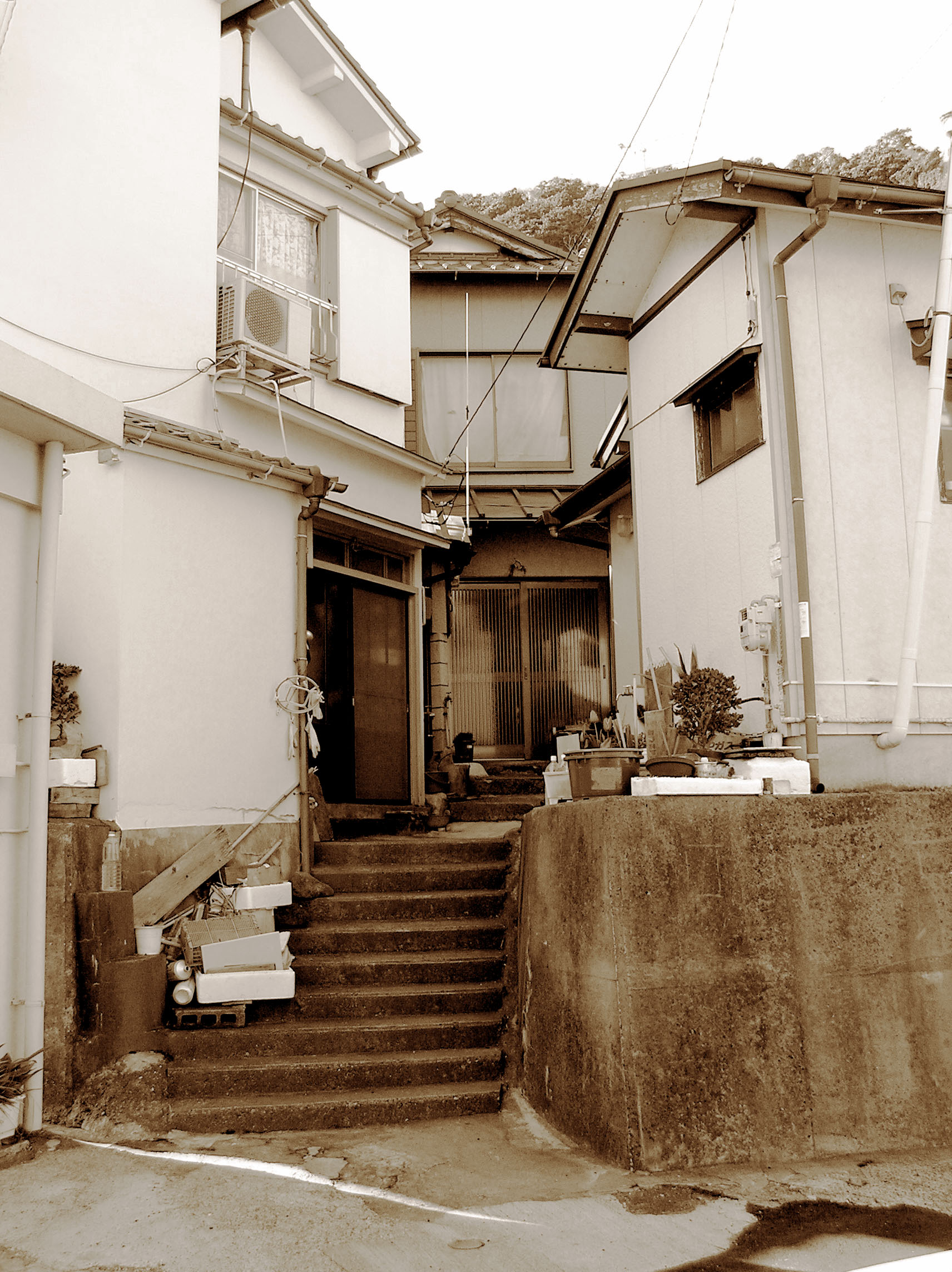 つげ義春『ねじ式』での機関車が民家の合間から飛び出してくるシーンに描かれた千葉県太海漁港近くの民家。建物は新しくなったが、その雰囲気はまだ残っている。 ～photo by Autumn Snake 【おぉたむ すねィく探検隊】